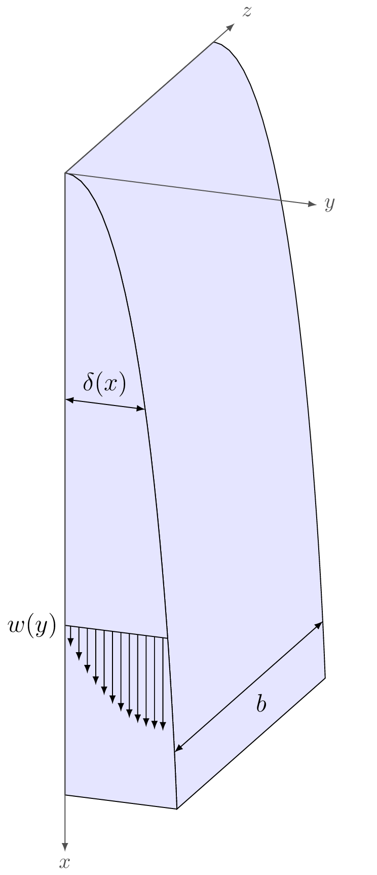 Schematische Darstellung eines Kondensatfilms nach Wilhelm Nußelt, enthält Filmdicke, Filmbreite und Geschwindigkeitsprofil